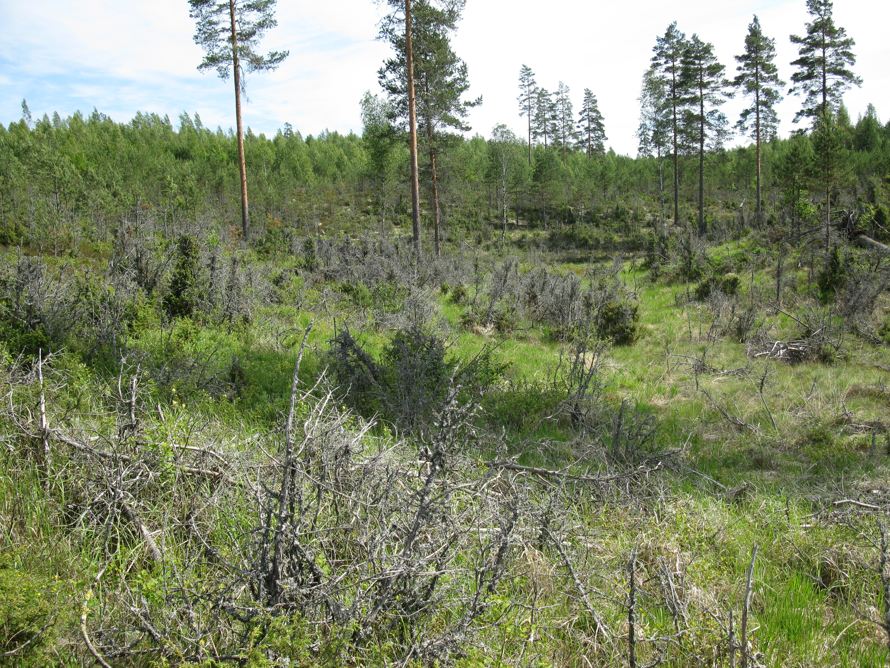 Suppakuopan mikroilmasto on johtunut pensaiden ja puuntaimien paleltumiseen talvella.